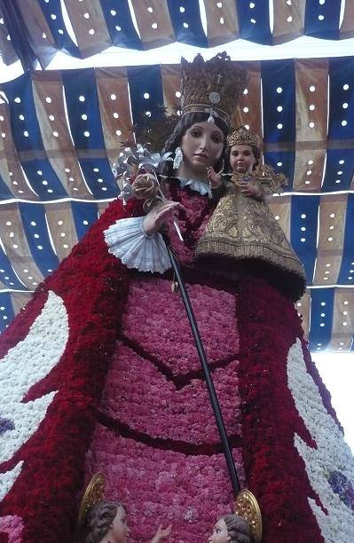 Mare de Deu dels Desamparats, ofrenda de flores de Valencia.